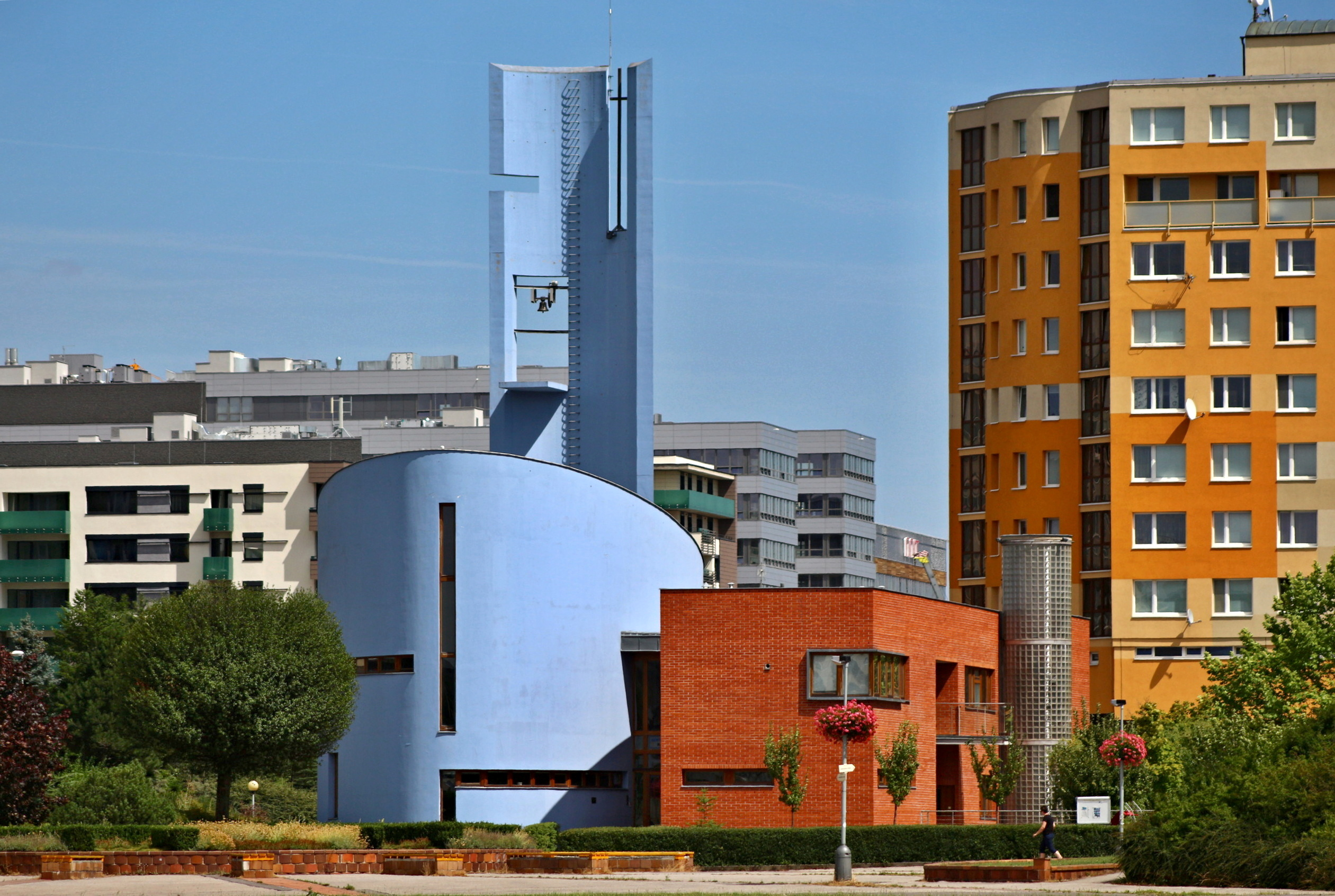 Kostel a centrum sv. Prokopa v Praze 13-Stodůlkách